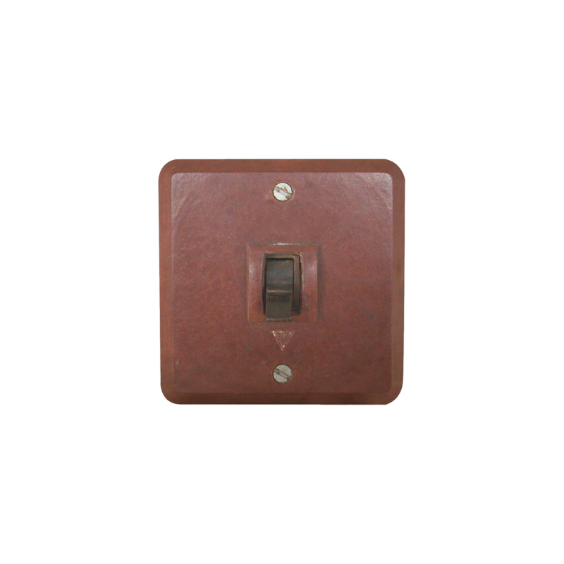 Wyłącznik hebelkowy kwadratowy, 1951 rok. Ówczesna nazwa producenta: Czechowickie Zakłady Wytwórcze Sprzętu instalacyjnego” z siedzibą w Czechowicach k/Bielska.